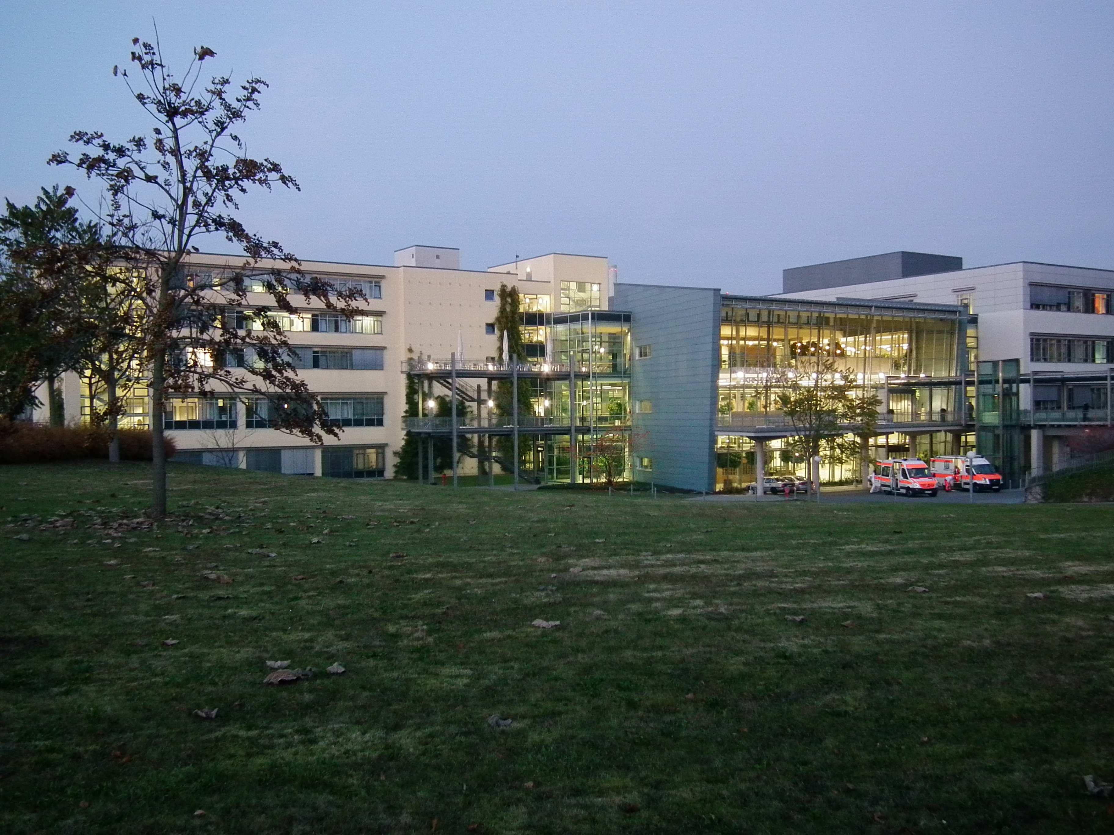 Medizinische Klinik im Neuenheimer Feld in Heidelberg (Baden-Württemberg, Deutschland), fotografiert in der Abenddämmerung